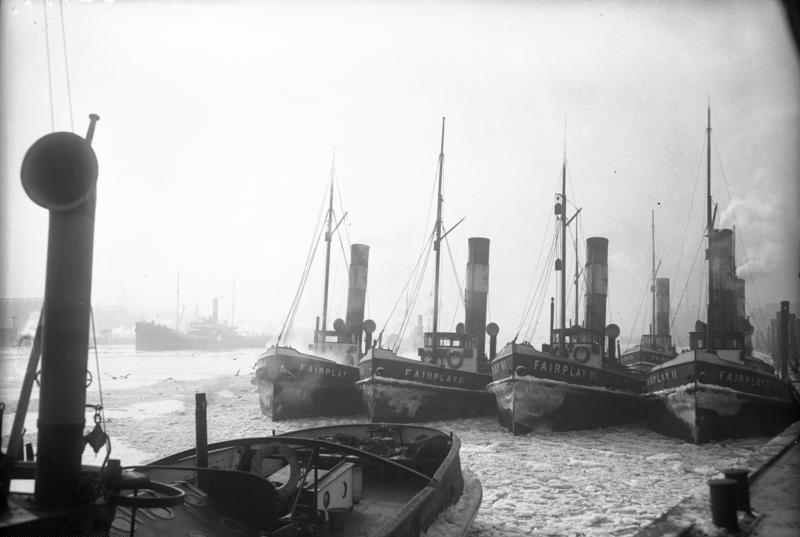 Hamburger Hafen im Schnee, Januar 1929